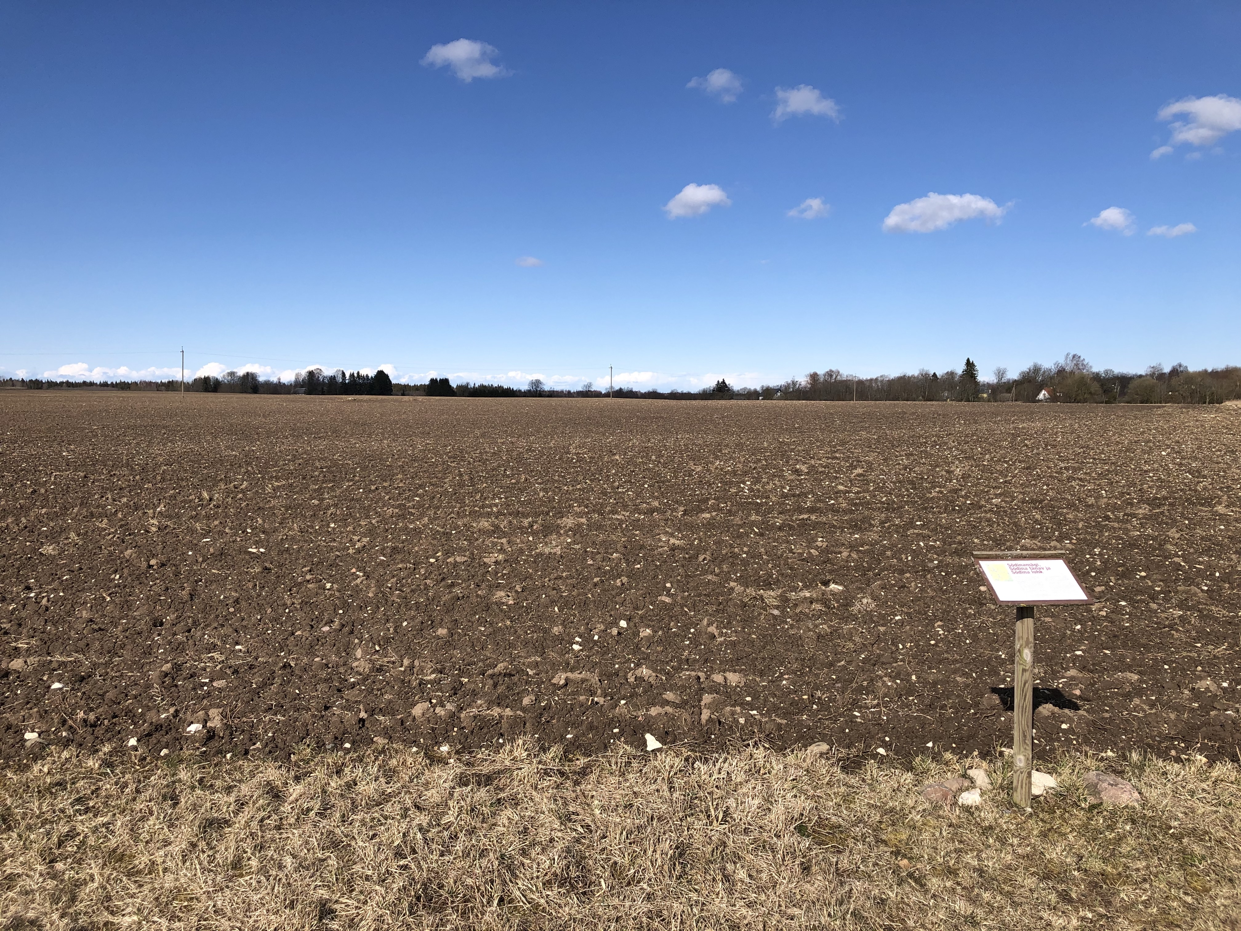 Põld Paeknas, Sõdinamägi